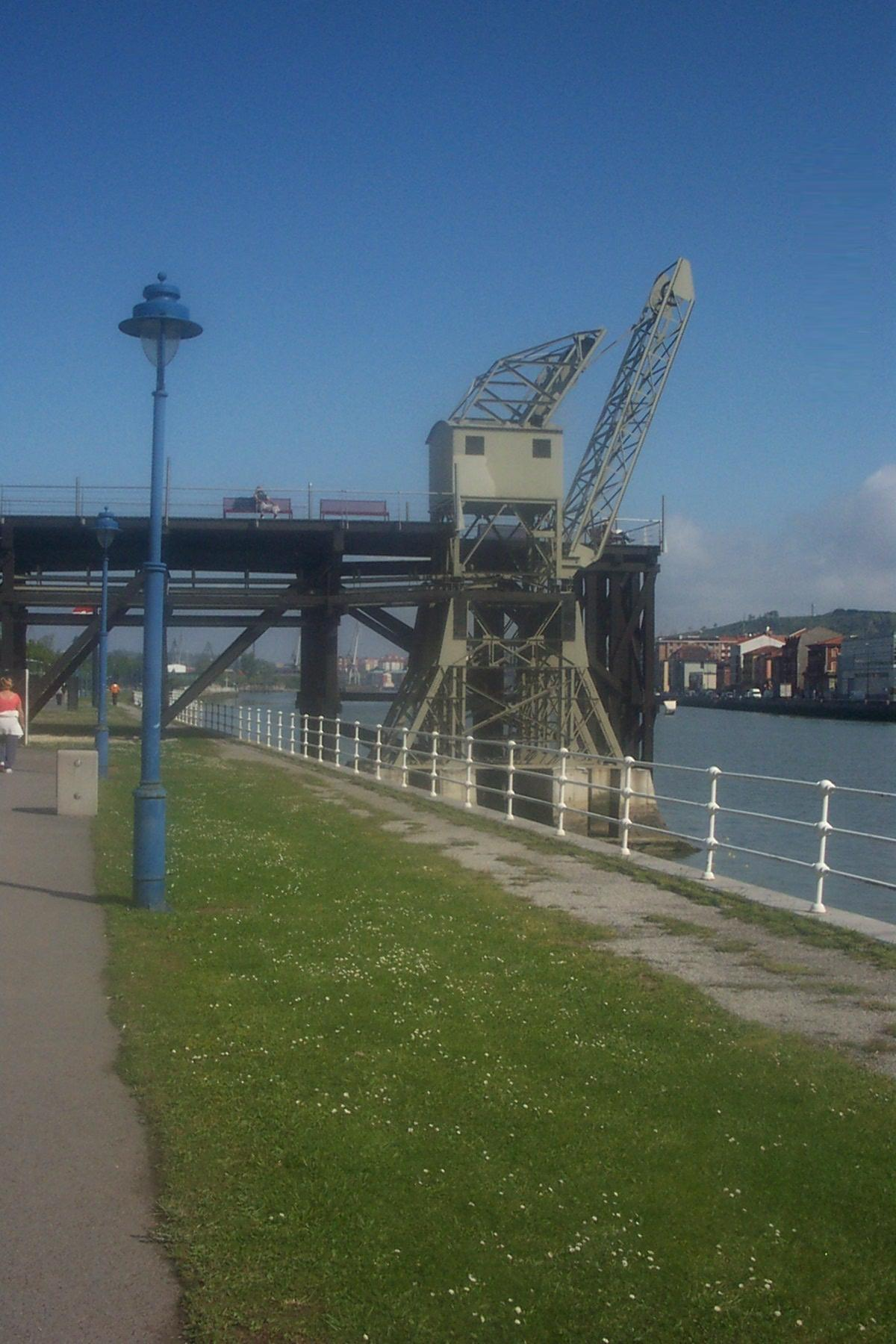 Cargadero de mineral reformado en Baracaldo